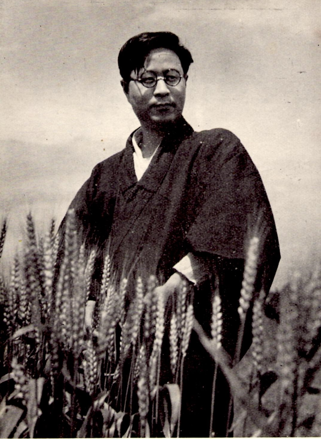 昭和27年刊『司馬遷』（創元文庫）より。